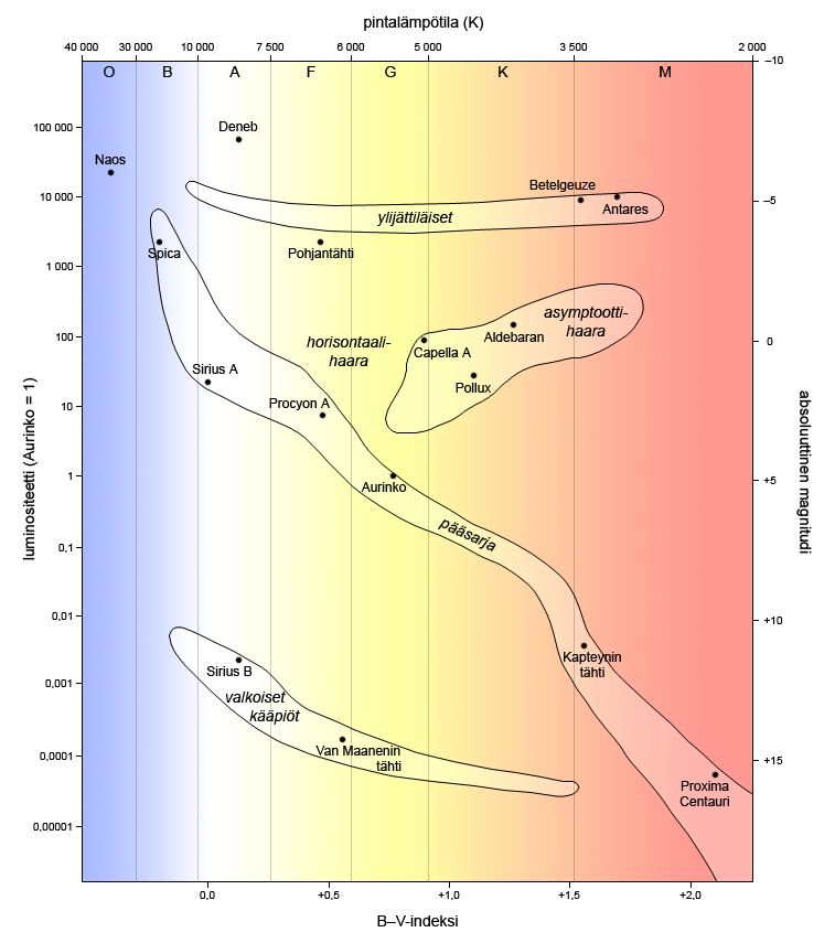 Hertzsprungin–Russellin kaavio.